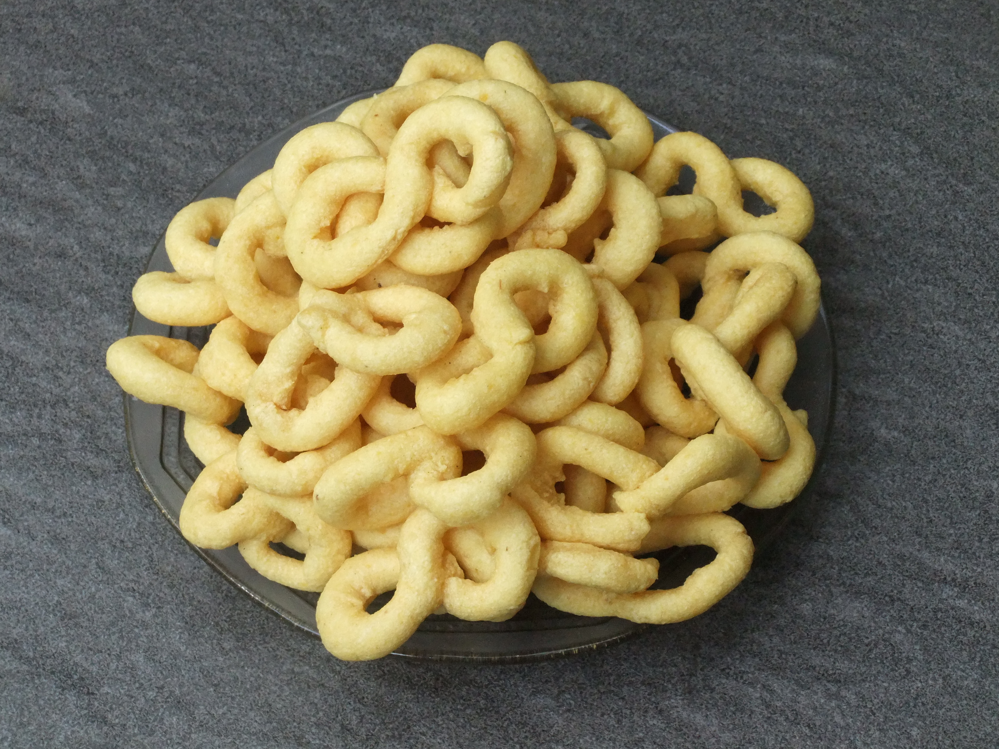 Karak kaliang khas Bukittinggi